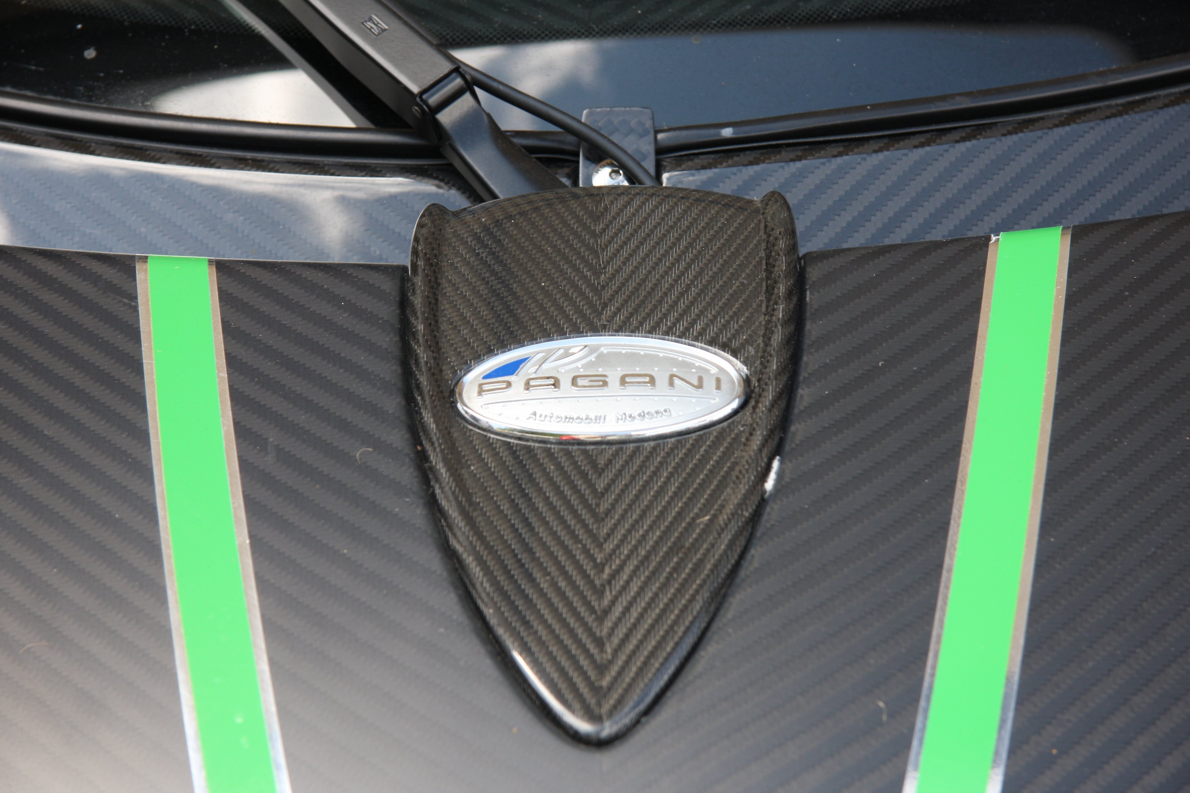 Pagani Zonda R motif